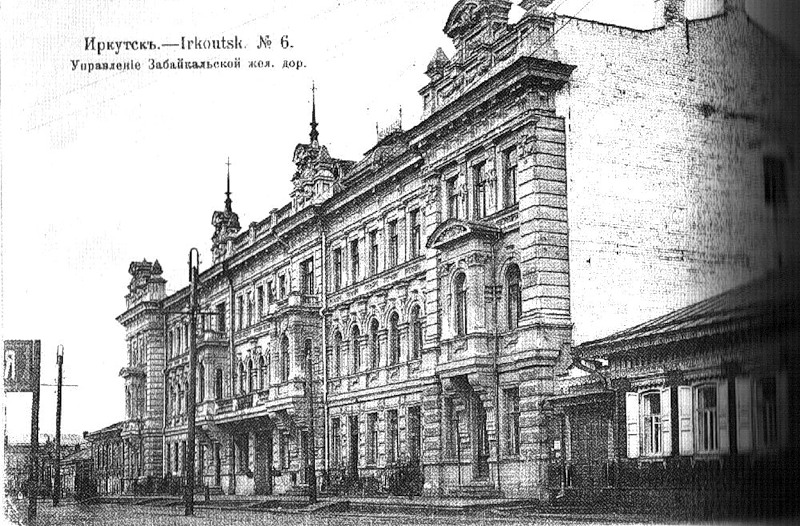 г. Иркутск. Дом Кузнеца.